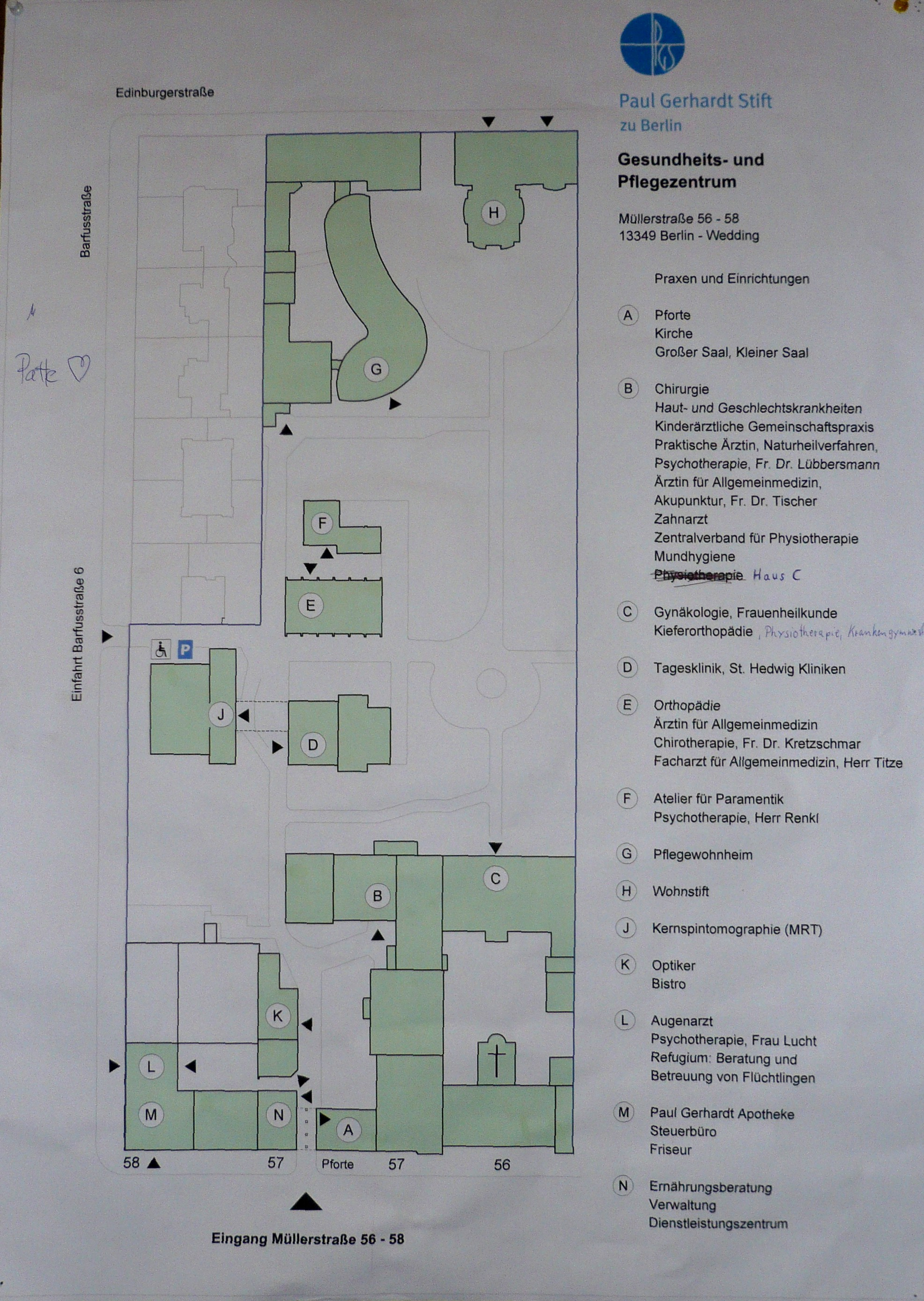 Paul-Gerhardt-Stift in der Müllerstraße, Lageplan